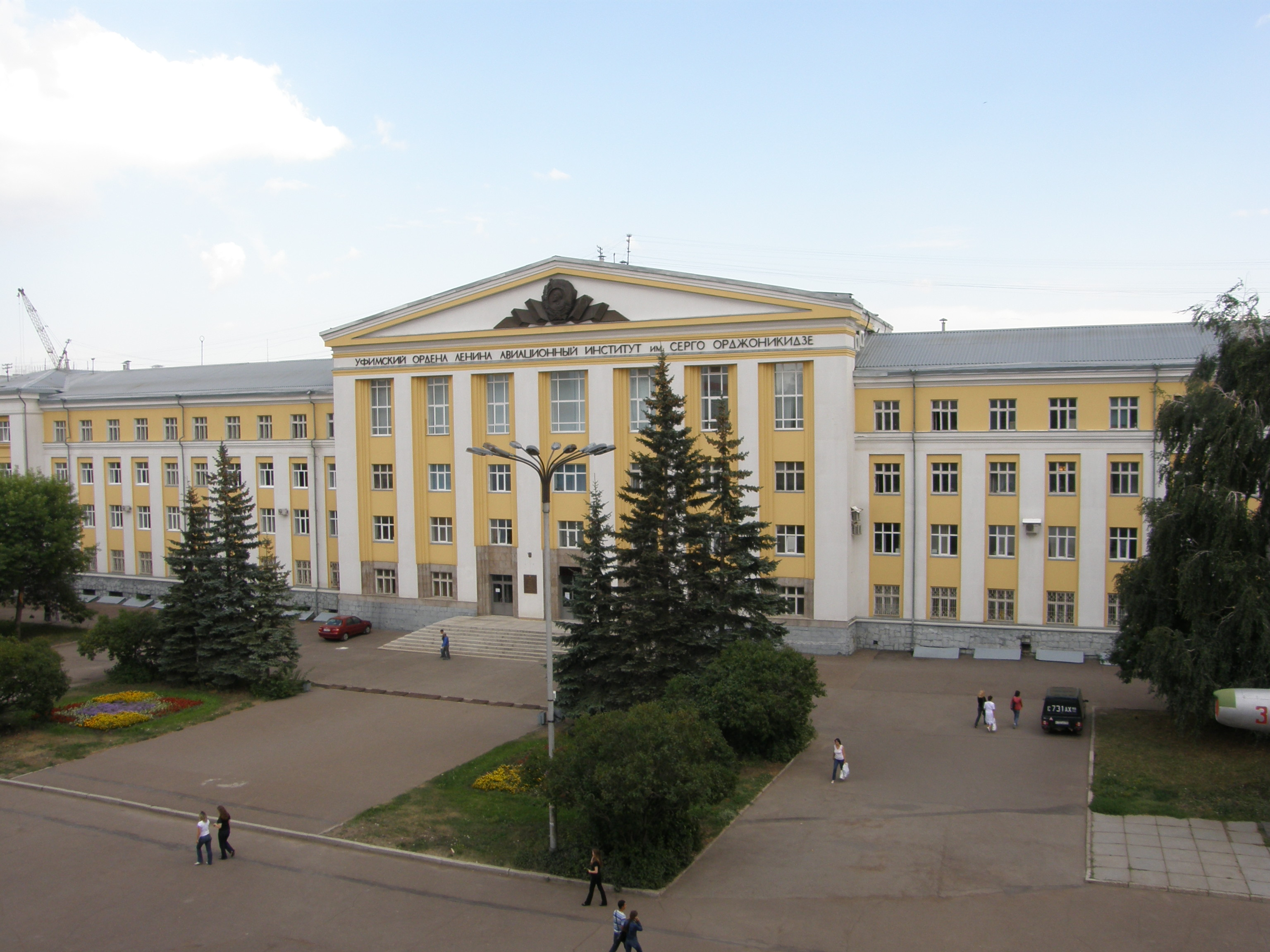 Уфимский государственный университет, корпус 1